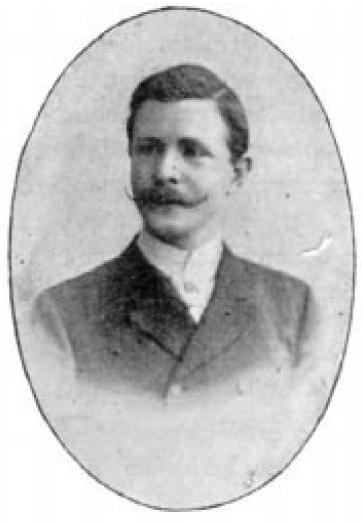 G. Streit, member of the organiasion team